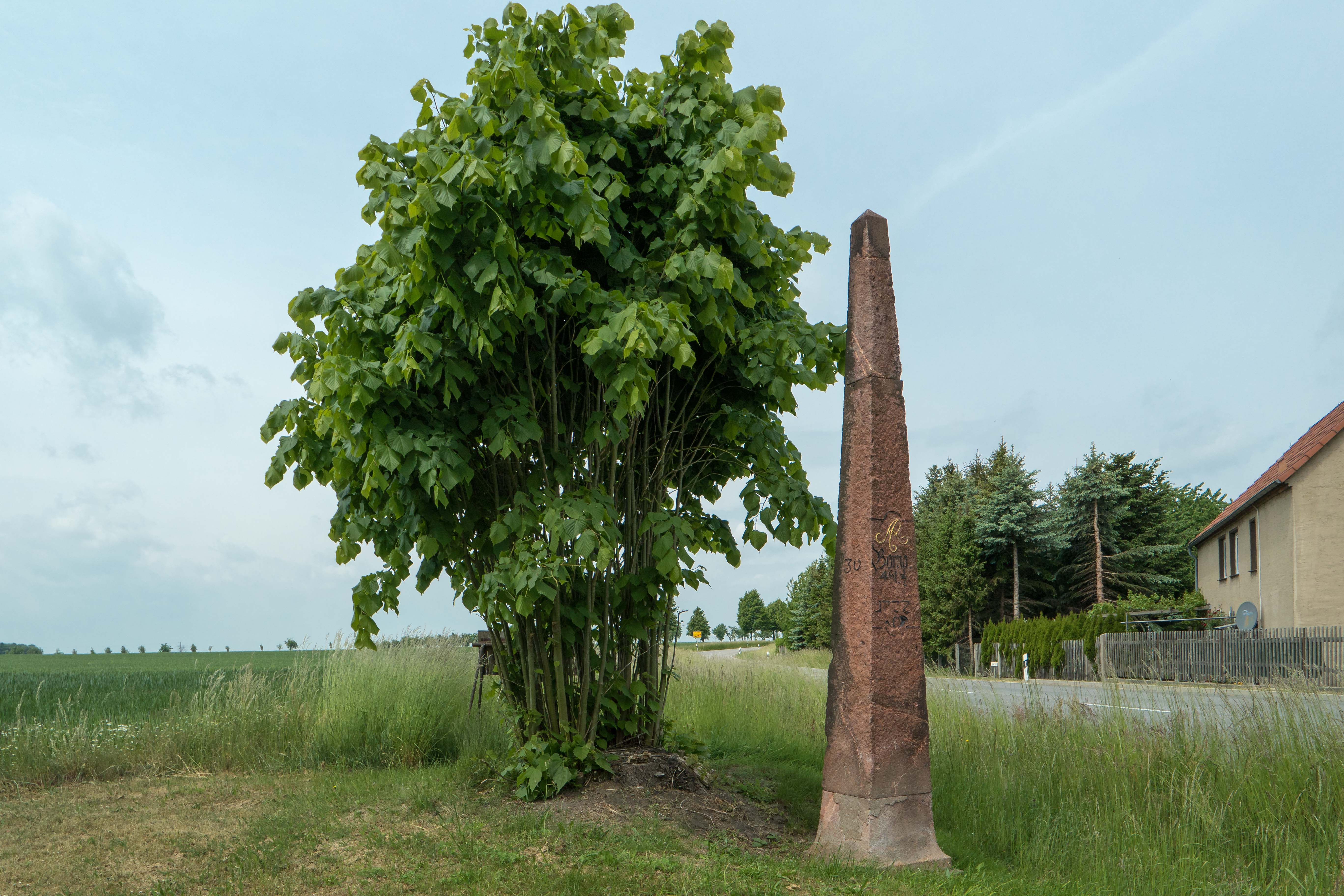 Kursächsische Postmeilensäule-Ganzmeilensäule Nr. 36, Goldene Höhe (B 176) in Ballendorf. Text: Seite 1: AR / Borna 4 ST. 1/2 / 1722 / Posthorn Seite 2: AR / Colditz 1 ST. 3/4 / 1722 / Posthorn